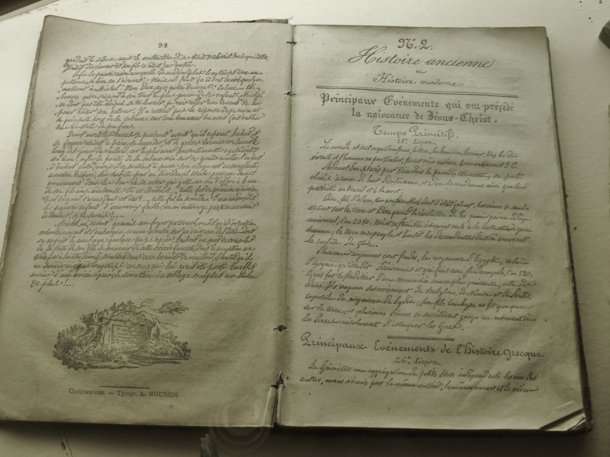 Livre scolaire "Histoire ancienne et histoire moderne", écrit à main; Le musée des Arts et Traditions populaires Joseph Vaylet, Espalion, dept. Aveyron, France